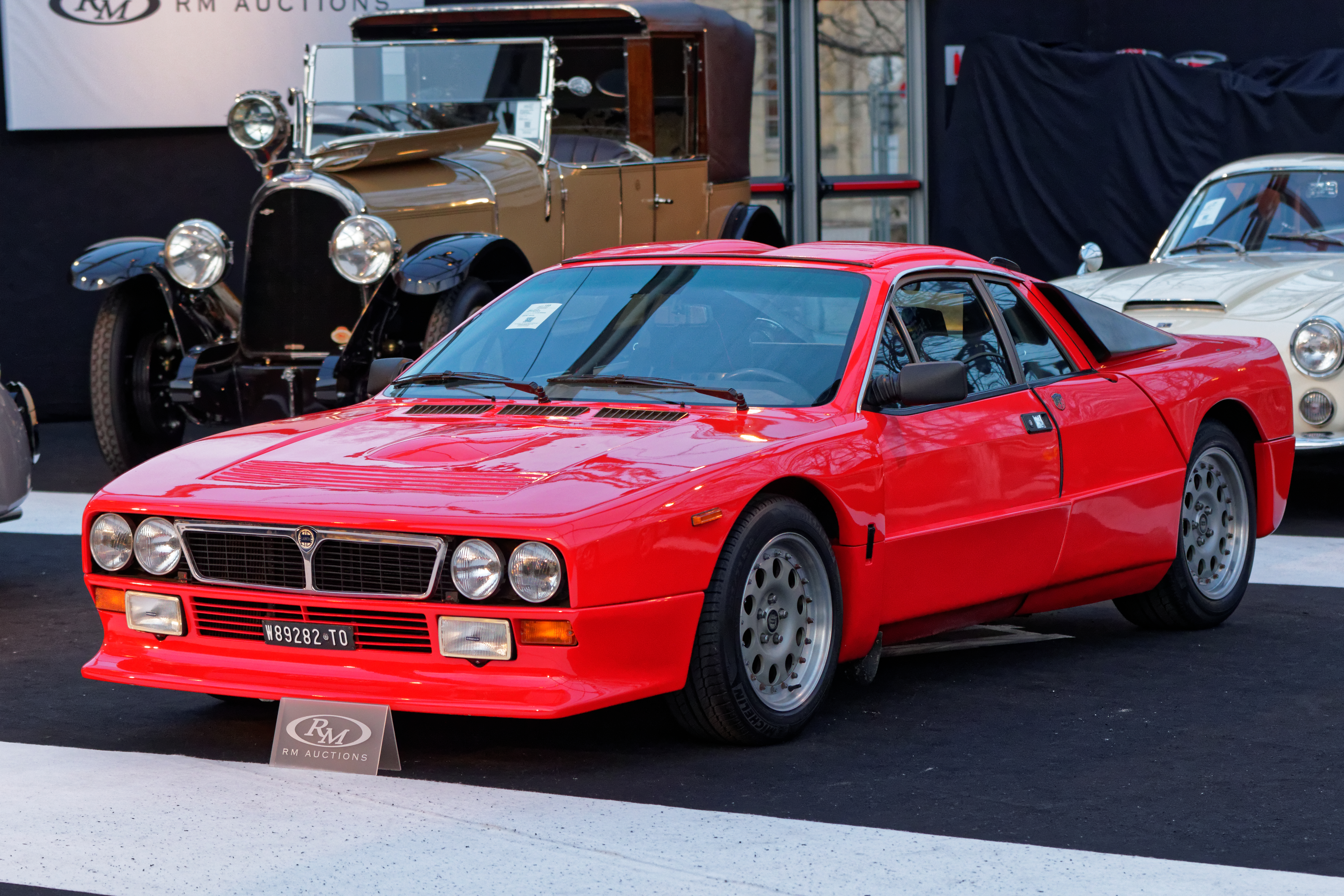 La vente aux enchères RM auctions aux pied des Invalides à Paris le 4 février 2015.